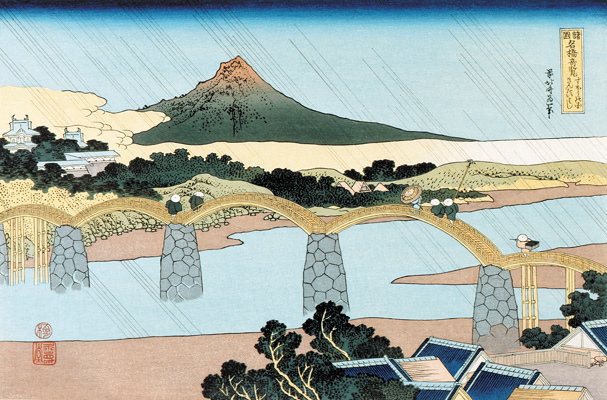 すほうの国きんたいはし(すおうのくにきんたいはし)